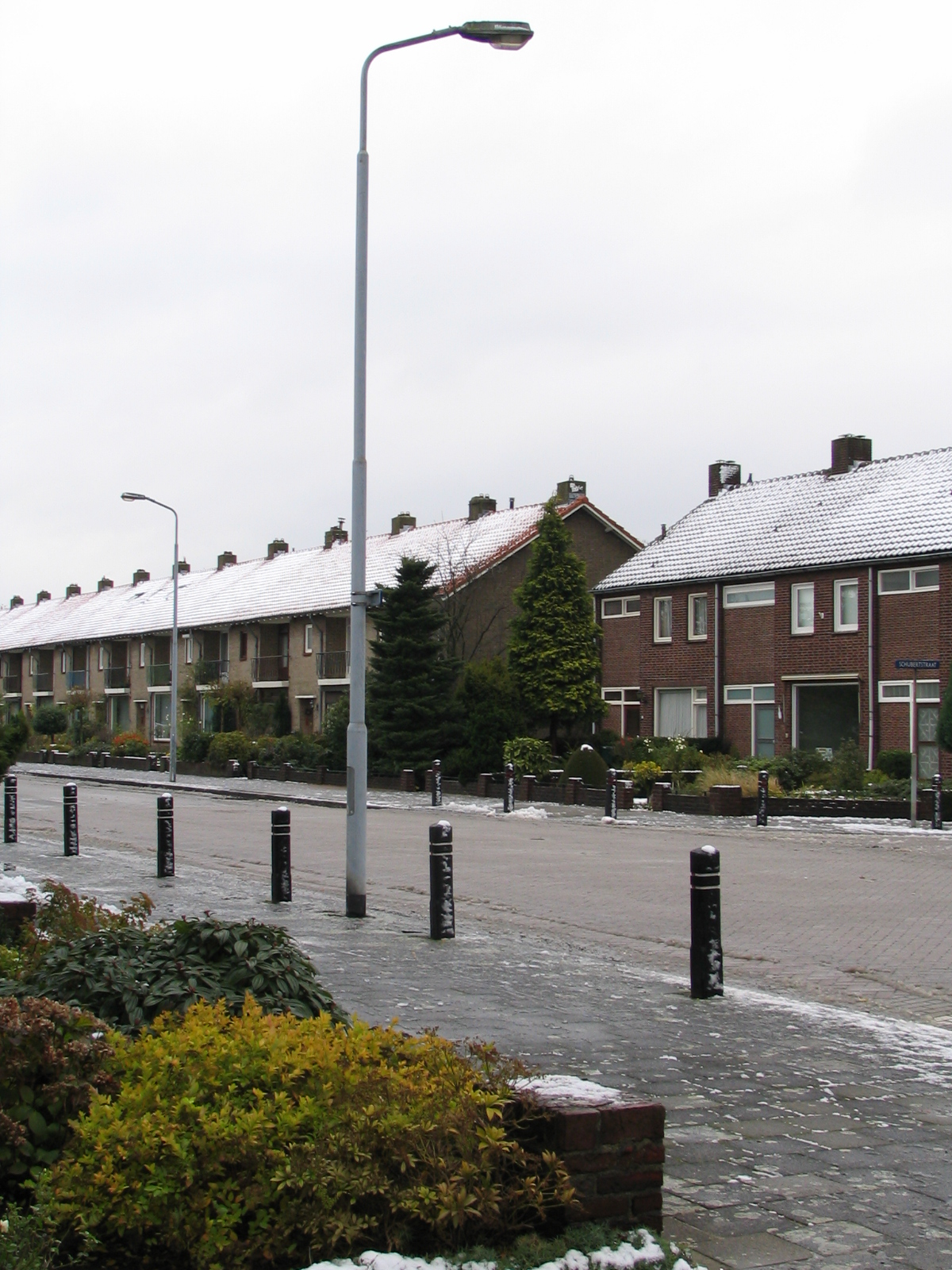 Hogeweg, a street in Venlo, Limburg (NL)